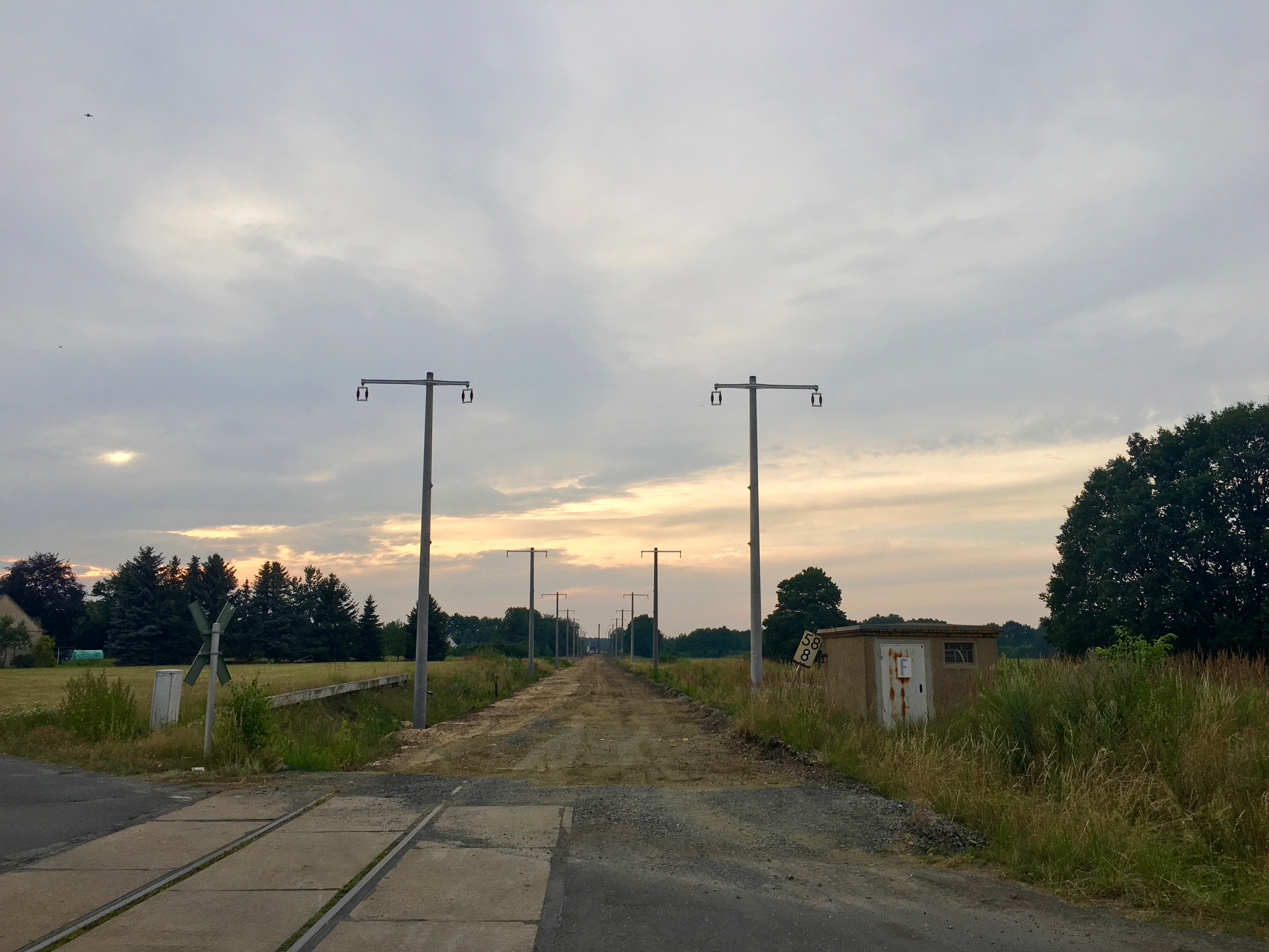 Streckenausbau Knappenrode–Horka im Juli 2016 in Höhe Bahnübergang Litschen. Oberleitungsmasten stehen bereits.